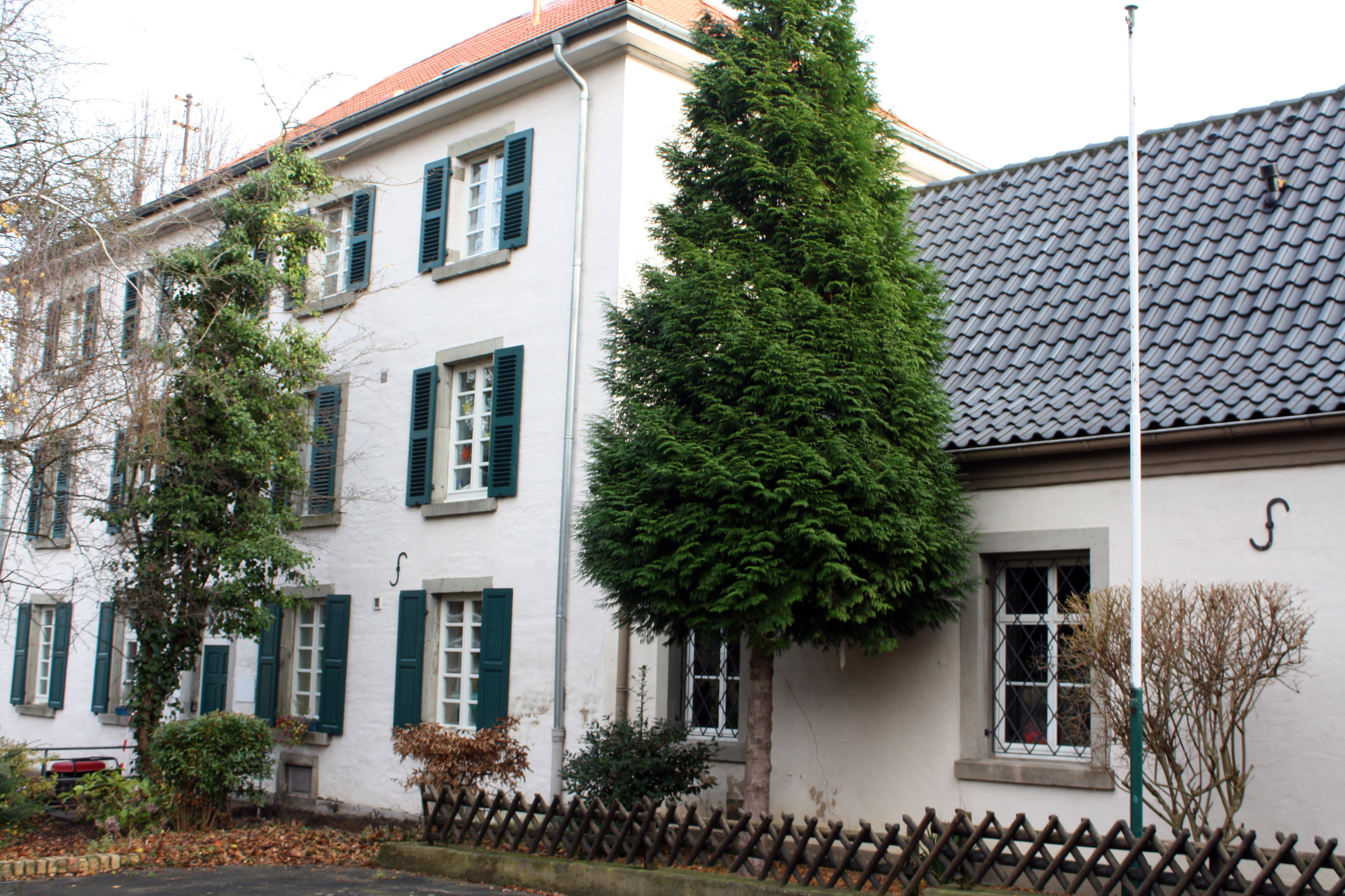 Hürth-Fischenich, Herrenhaus des Fronhofes (Rest) von 1770